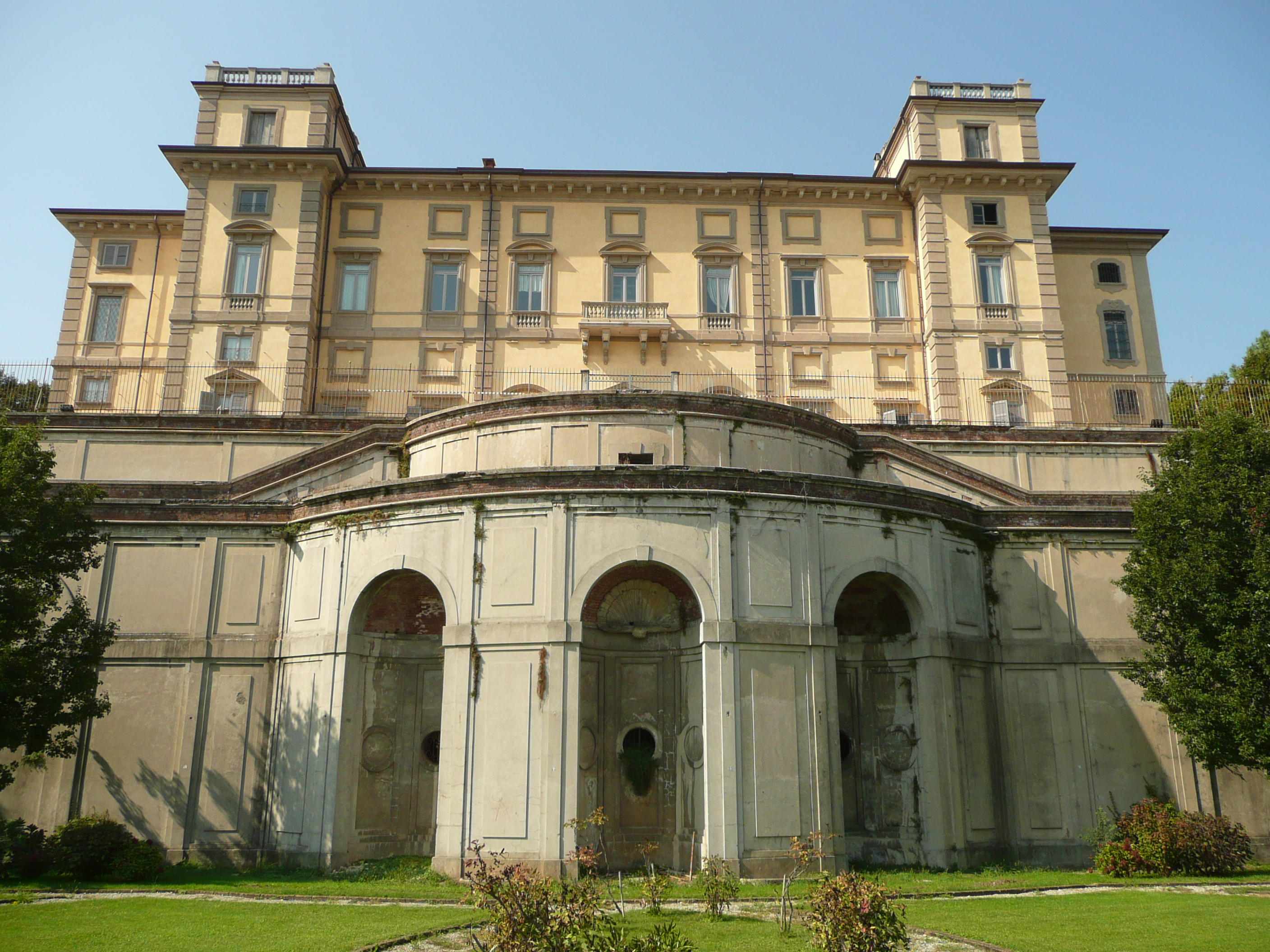 Limbiate, Villa Pusterla Arconati Crivelli - fronte verso il parco